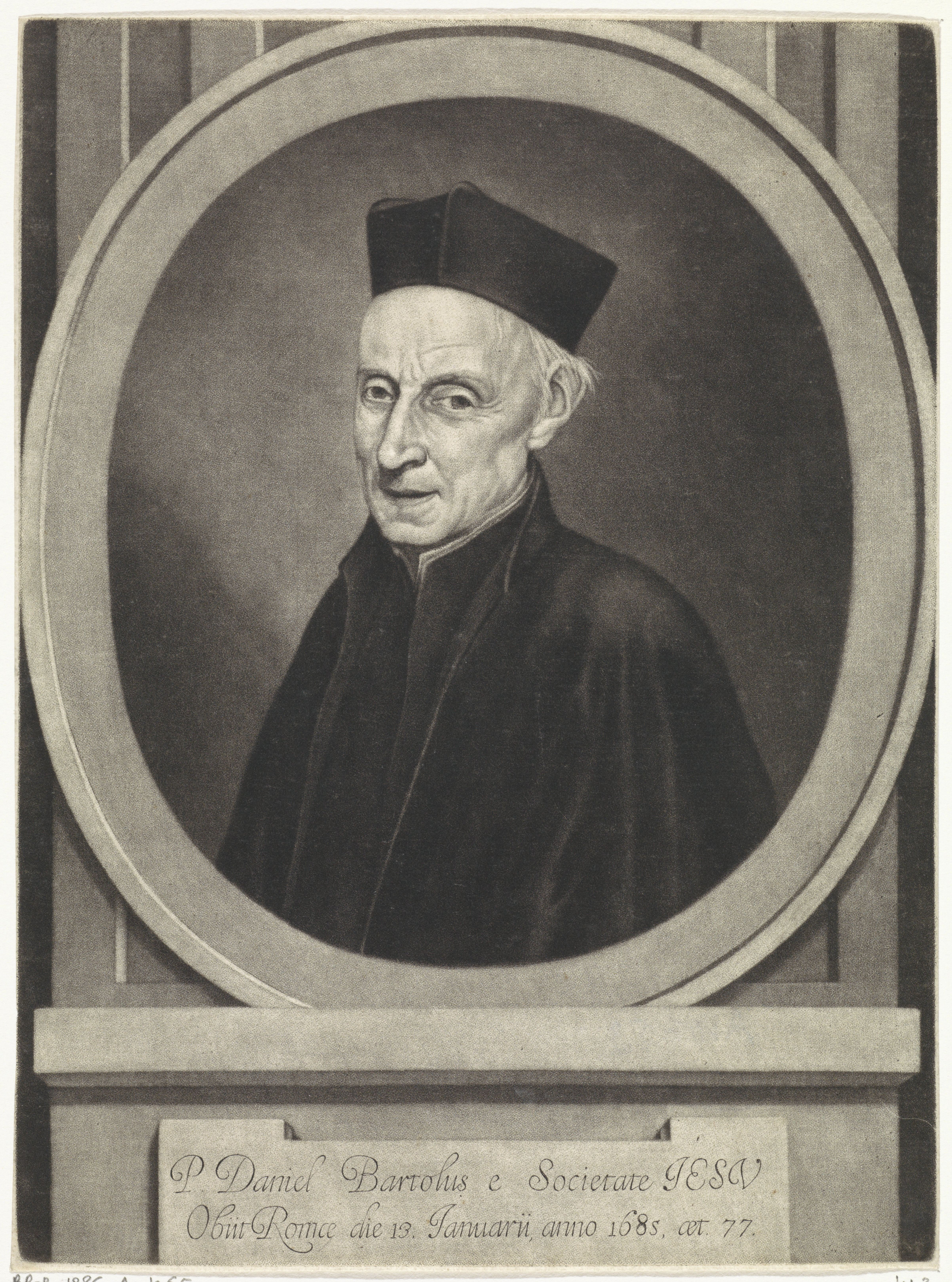 IdentificatieTitel(s): Portret van Daniel BartolusObjecttype: prent Objectnummer: RP-P-1886-A-10653Catalogusreferentie: Wurzbach 3LeBlanc 12Opschriften / Merken: verzamelaarsmerk, verso, gestempeld: Lugt 2228Omschrijving: Portret van de geestelijke Daniel Bartolus op 77-jarige leeftijd.VervaardigingVervaardiger: prentmaker: Jan van der BruggenPlaats vervaardiging: ParijsDatering: 1685Fysieke kenmerken: mezzotint en gravureMateriaal: papier Techniek: mezzotint / graveren (drukprocedé)Afmetingen: plaatrand: h 230 mm × b 170 mmOnderwerpWie: Daniel BartolusVerwerving en rechtenVerwerving: aankoop 20-apr-1886Copyright: Publiek domein